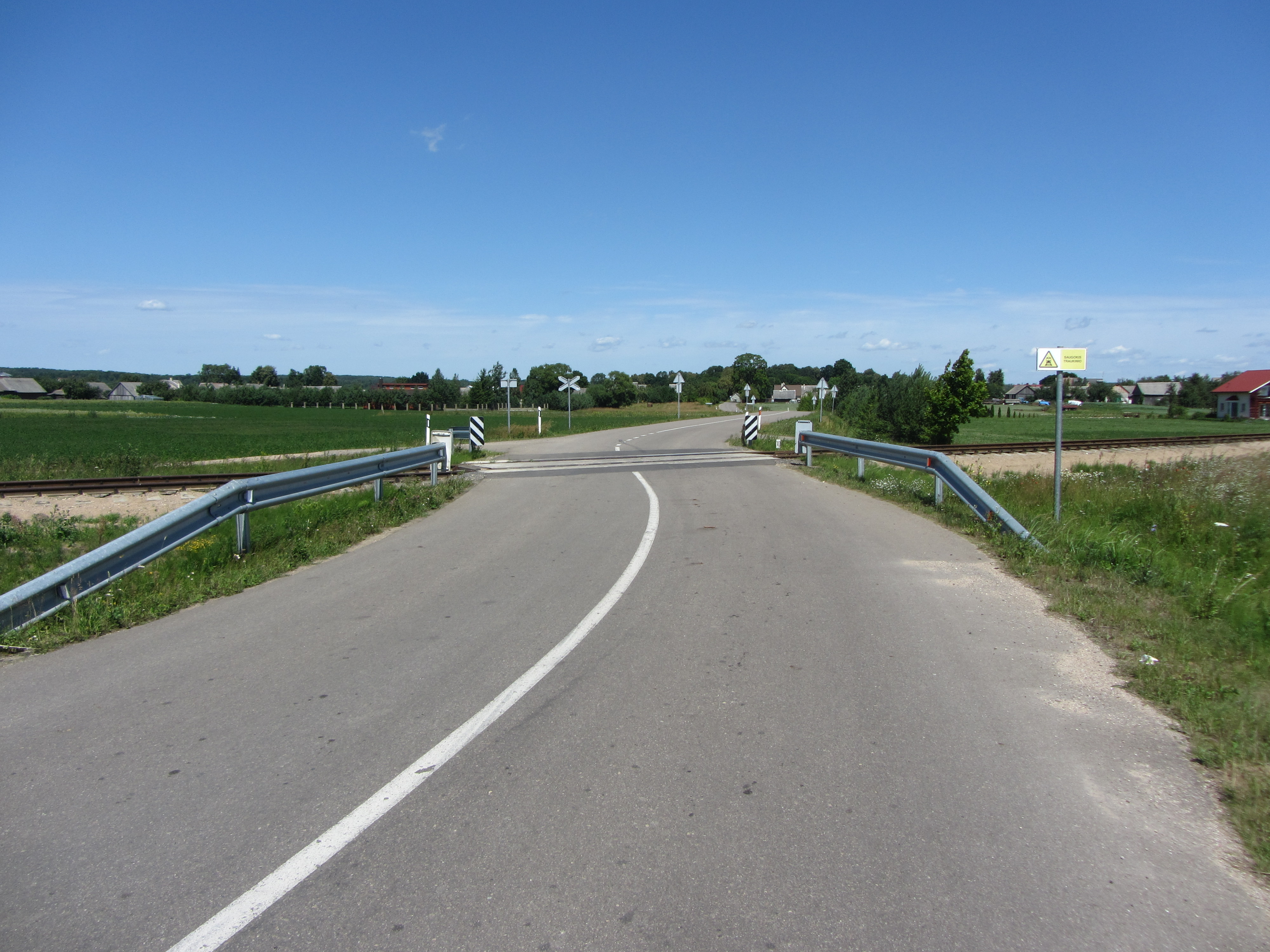 Gabriliava 26131, Lithuania